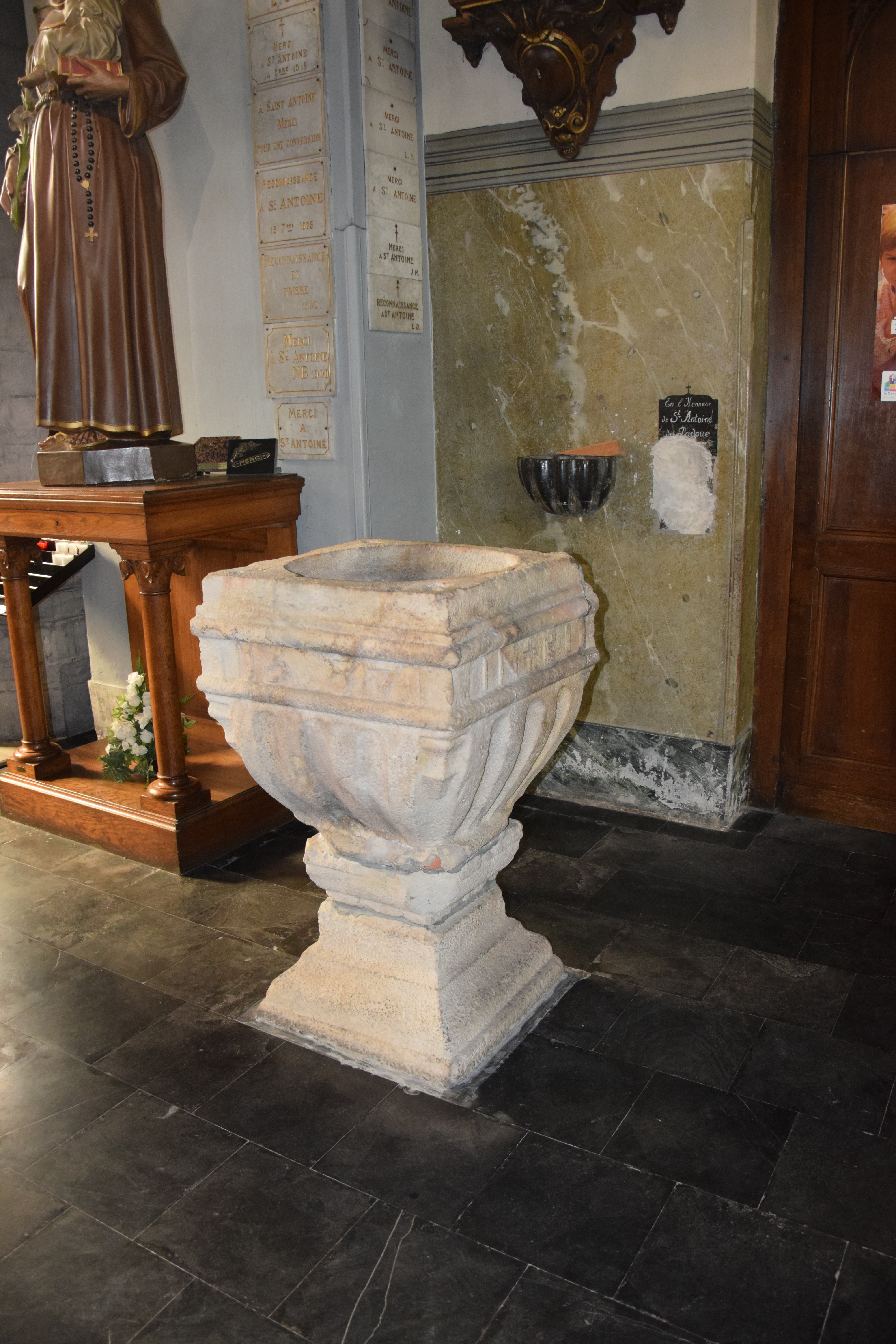 Église Saint-Martin de Solesmes